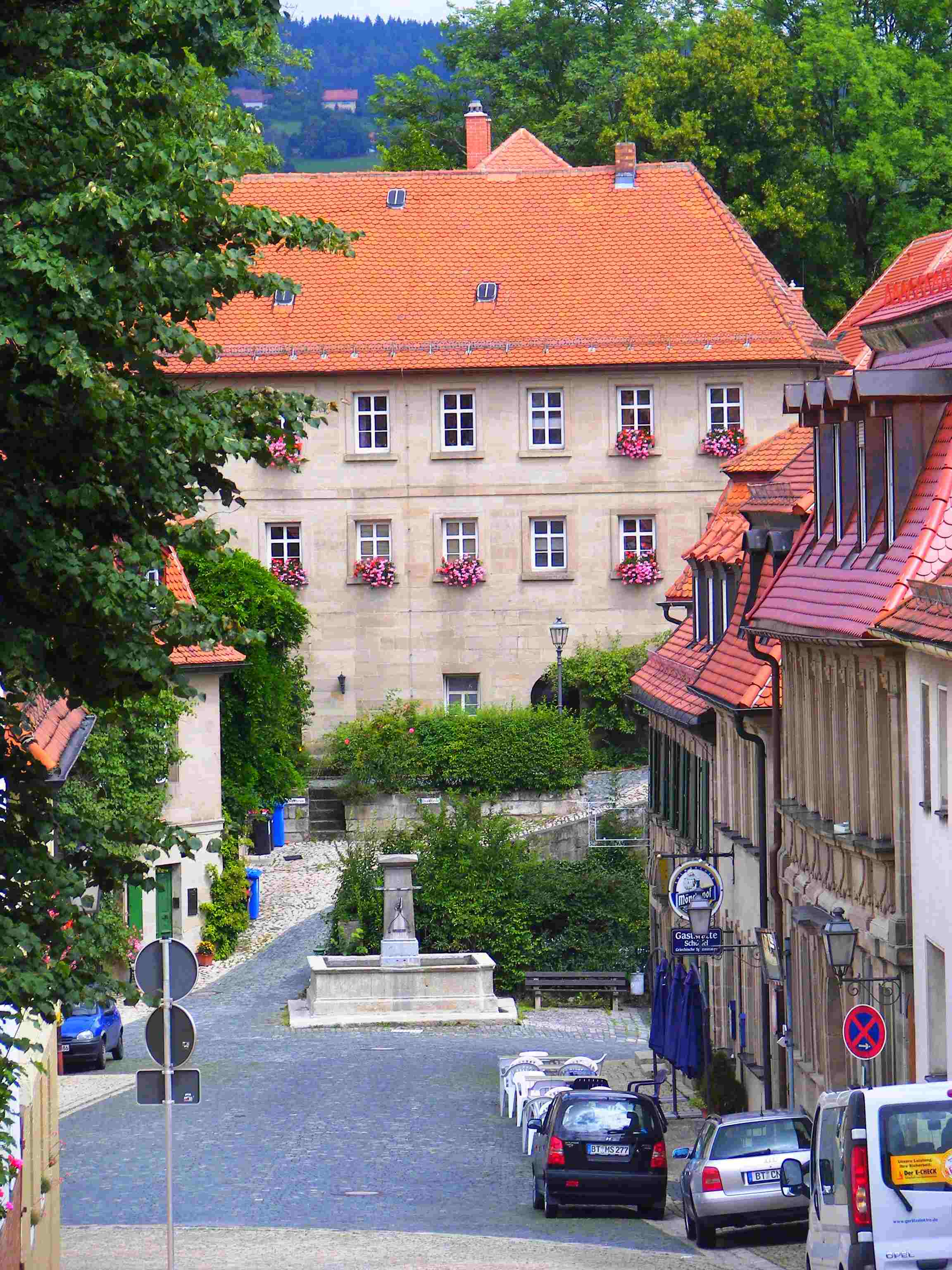 Die Obere Marktstraße im historischem Obermarkt